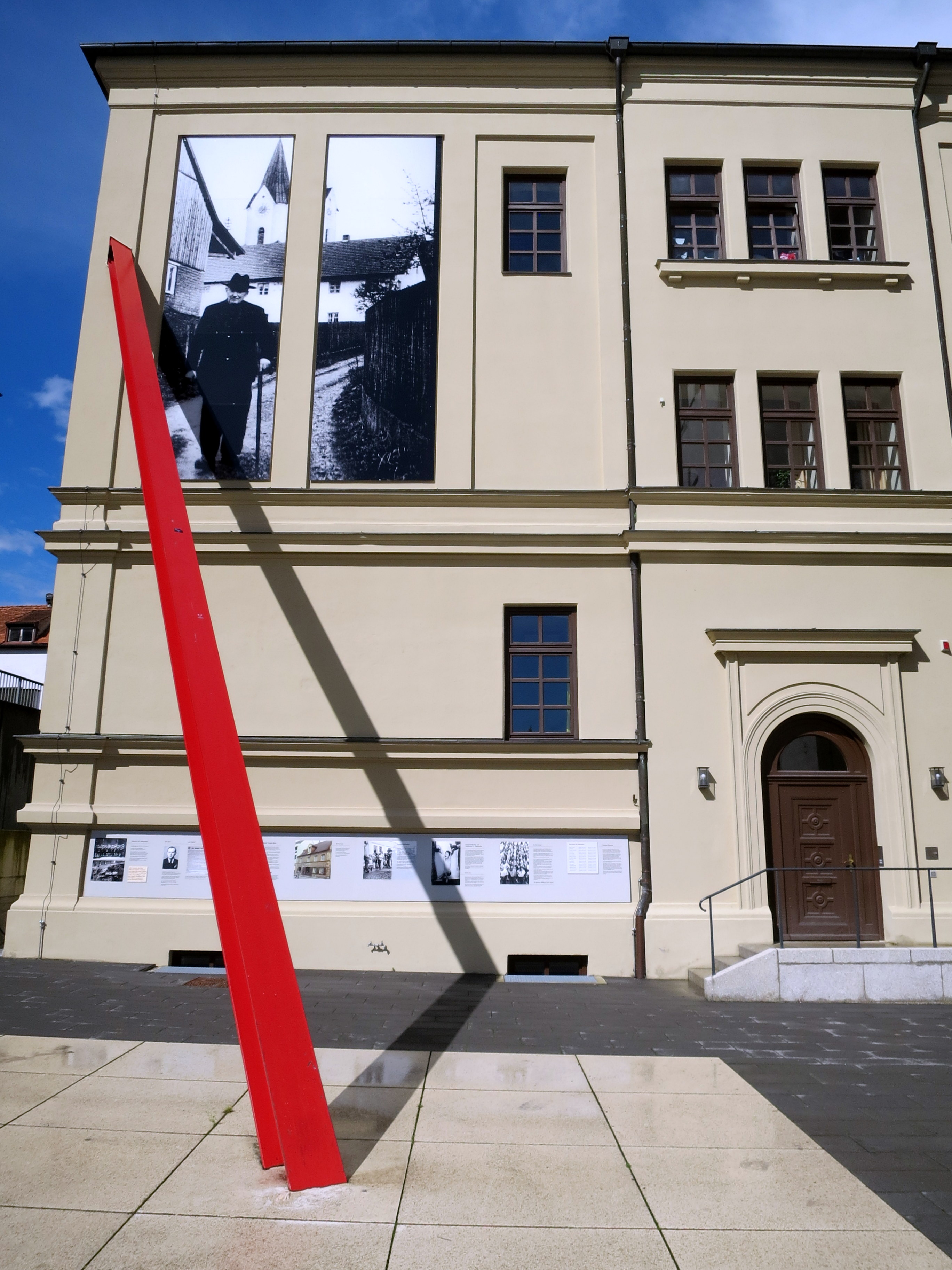 Sie befindet sich an der Südwand des Hauses der Begegnung